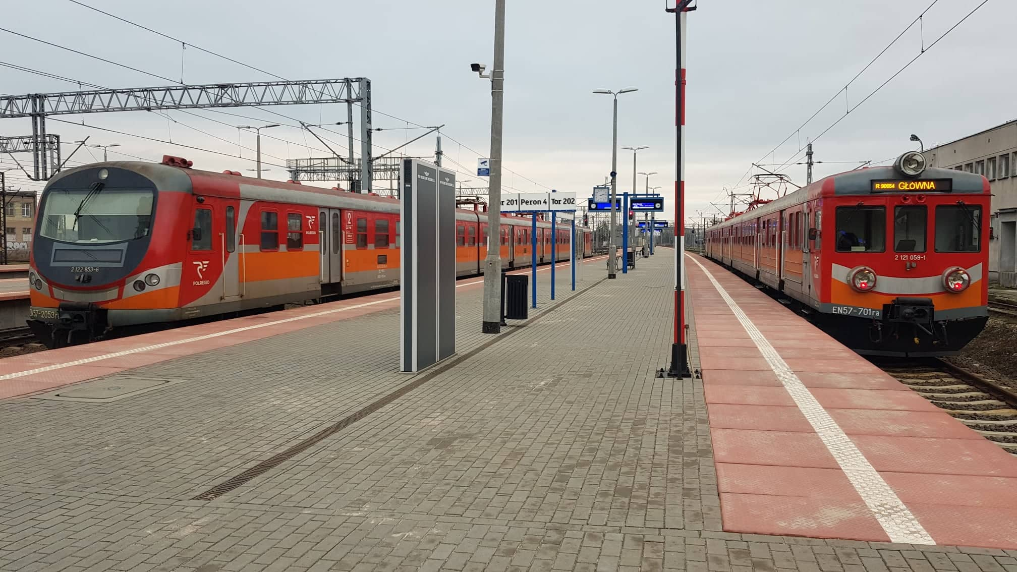 Pociągi na stacji Malbork, które przejeżdżają przez przystanek kolejowy Gronajny.